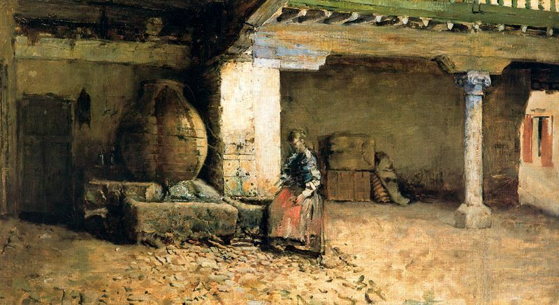 Oleo del paisajista cántabro del patio de carruajes de la célebre "Posada de la sangre", venta toledana (Toledo, España) donde se ha querido suponer que Miguel de Cervantes escribiera La Ilustre Fregona. Centrando la composición, Casimiró pintó una moza, el pilón de una fuente y detrás una gran tinaja.